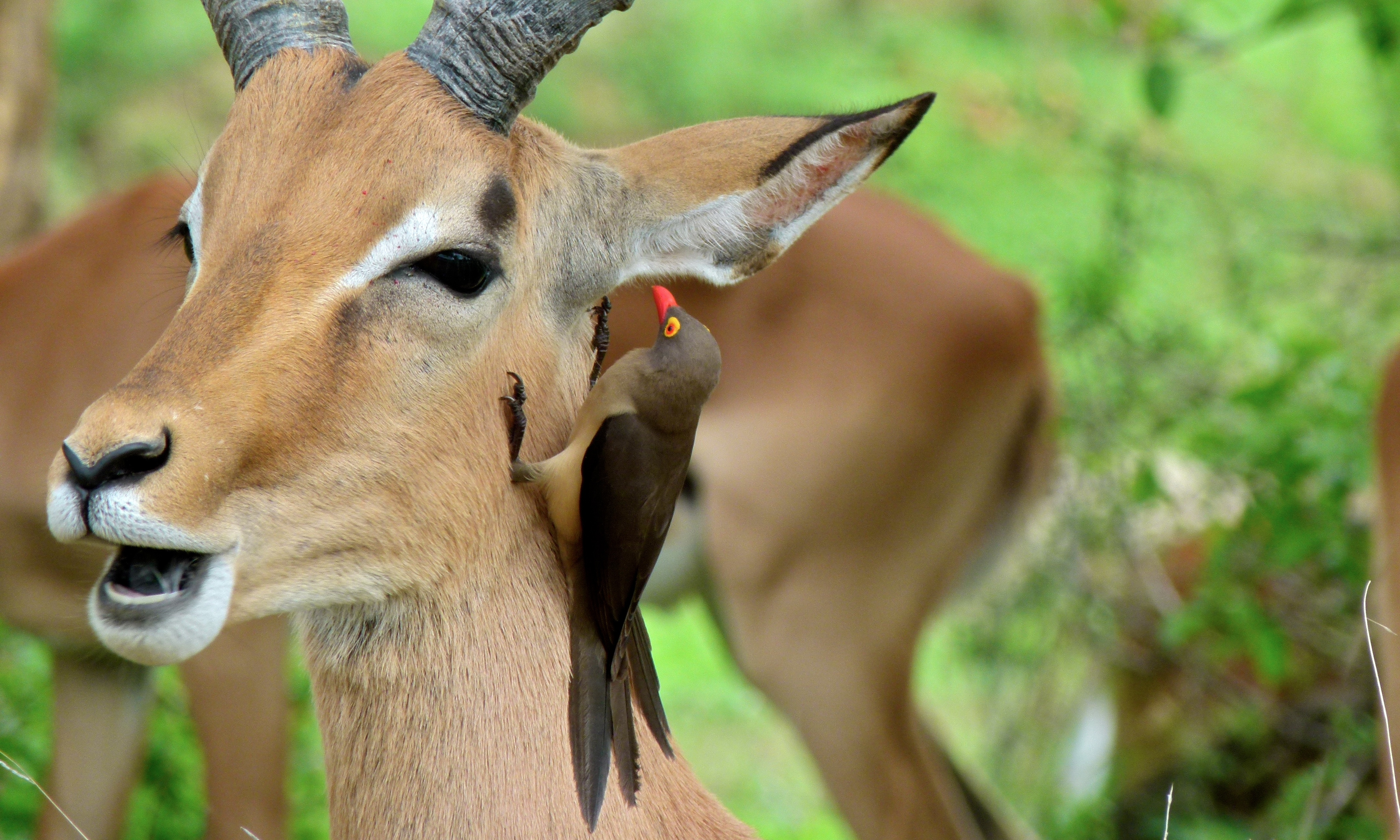 H4-1 near Skukuza, Kruger NP, SOUTH AFRICA